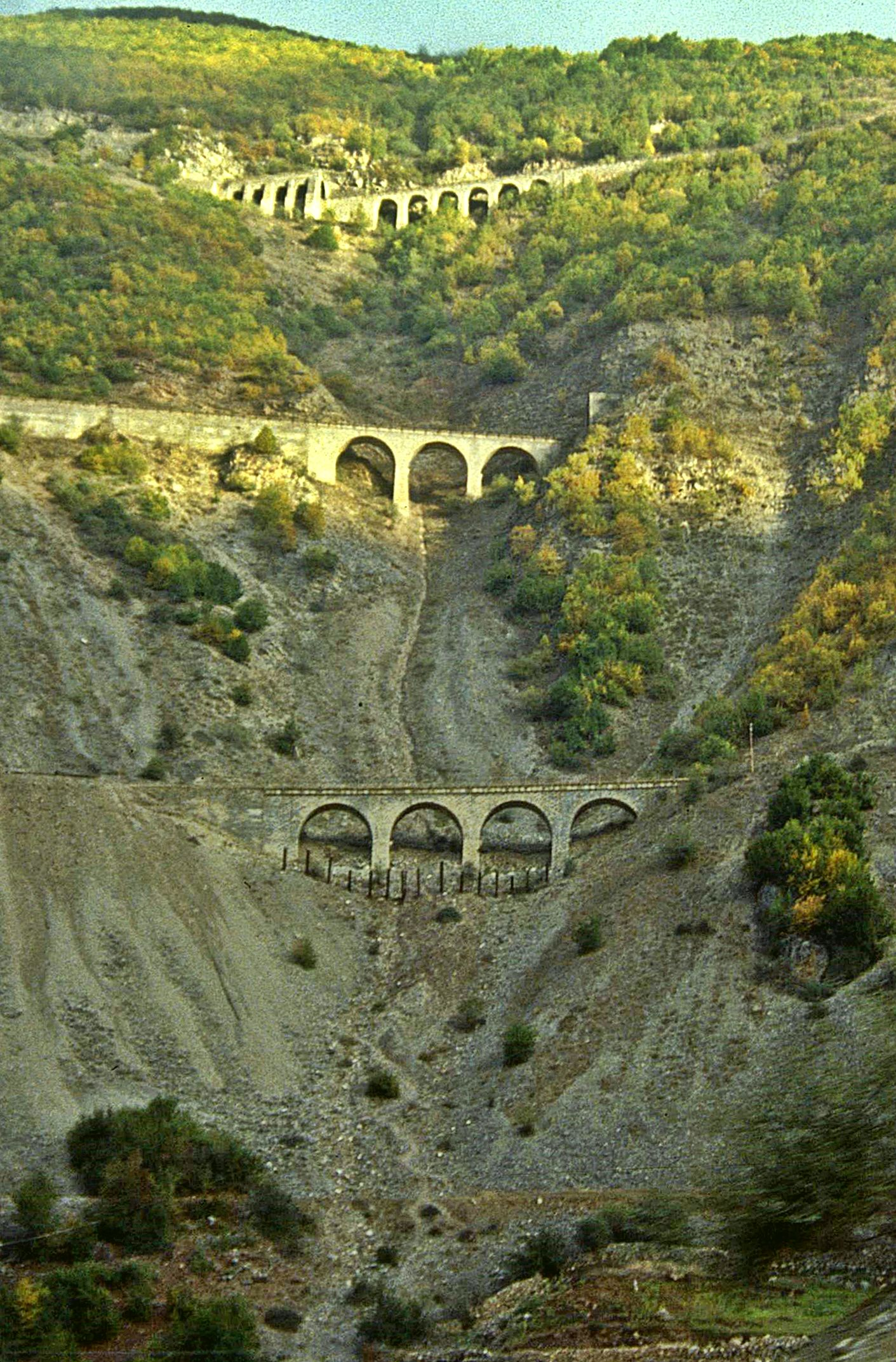 Elbursgebirge